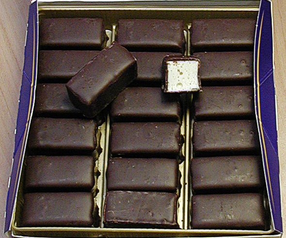 Ptasie mleczko, oder auch Vogelmilch